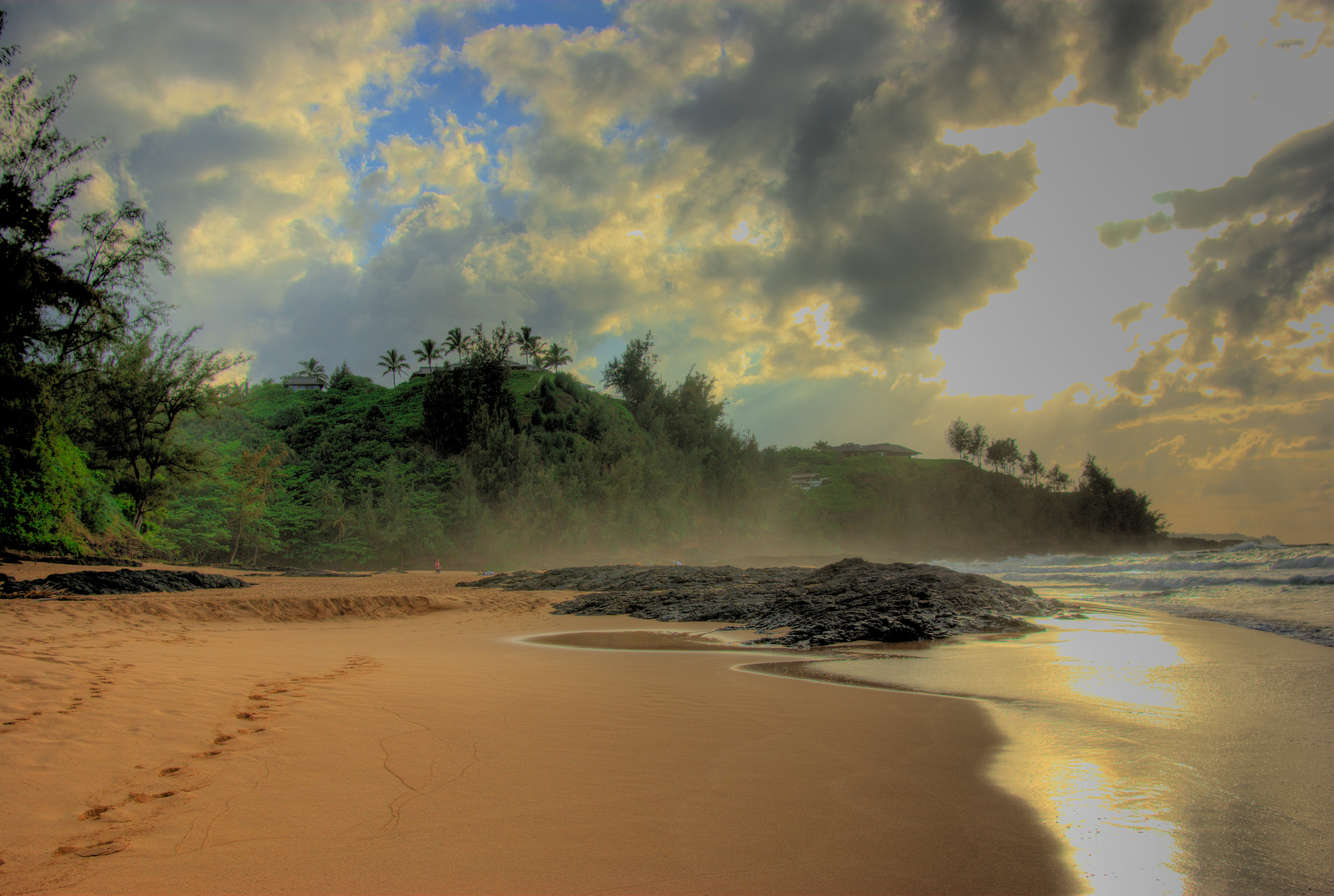 Kauai, HI